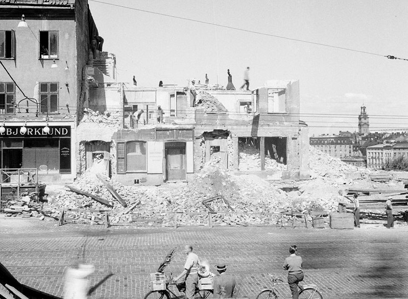 Hornsgatan 20-24 (kvarteret Överkikaren) under rivning